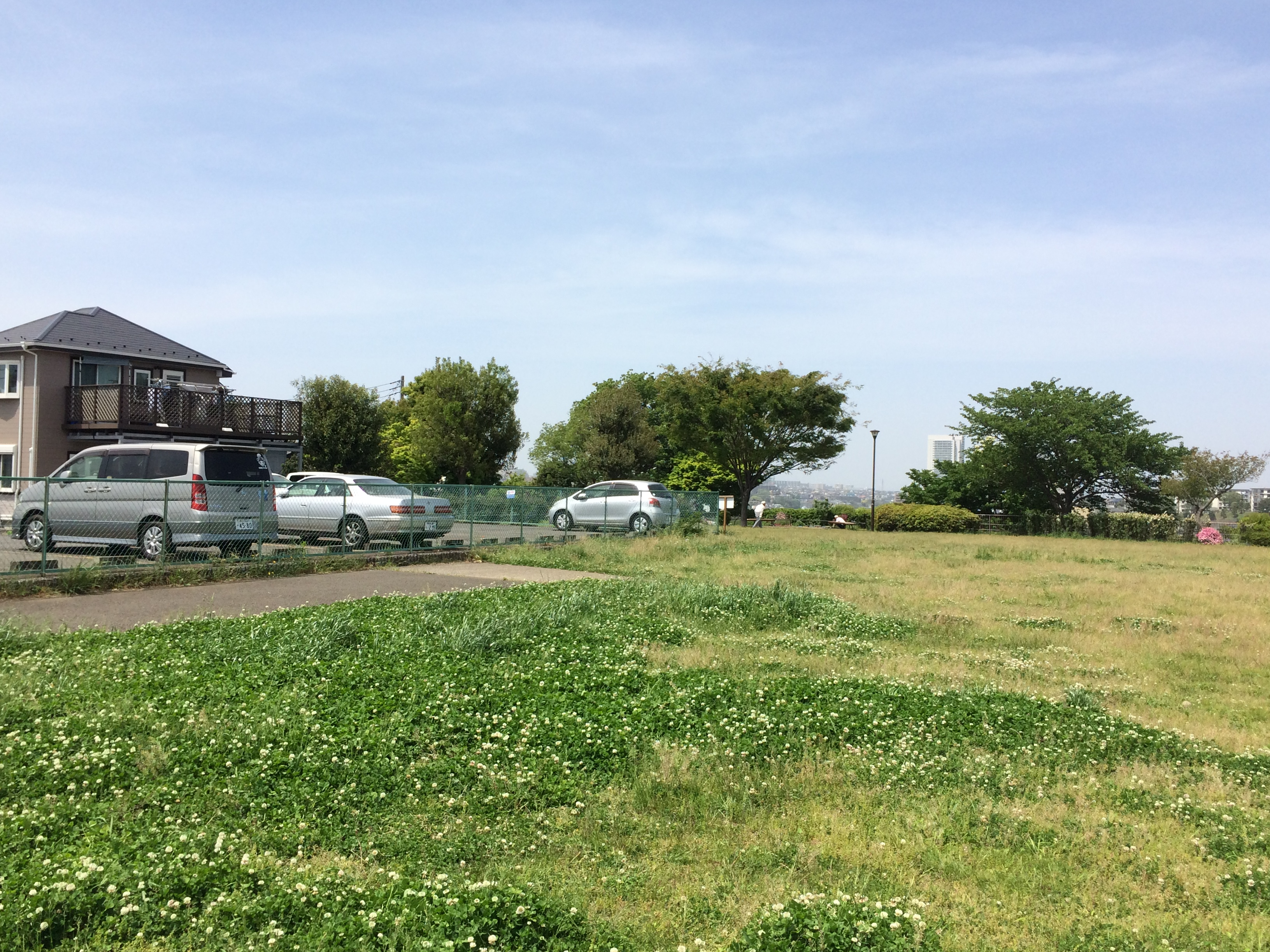 園内